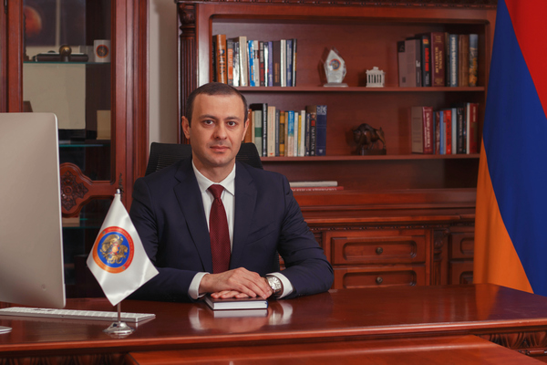 Armen V. Grigoryan